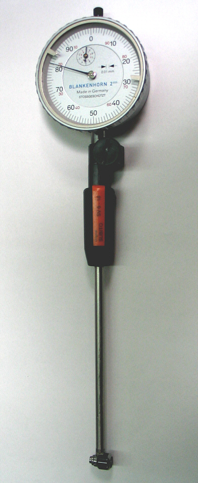 Bore gauge / Innenmessgerät